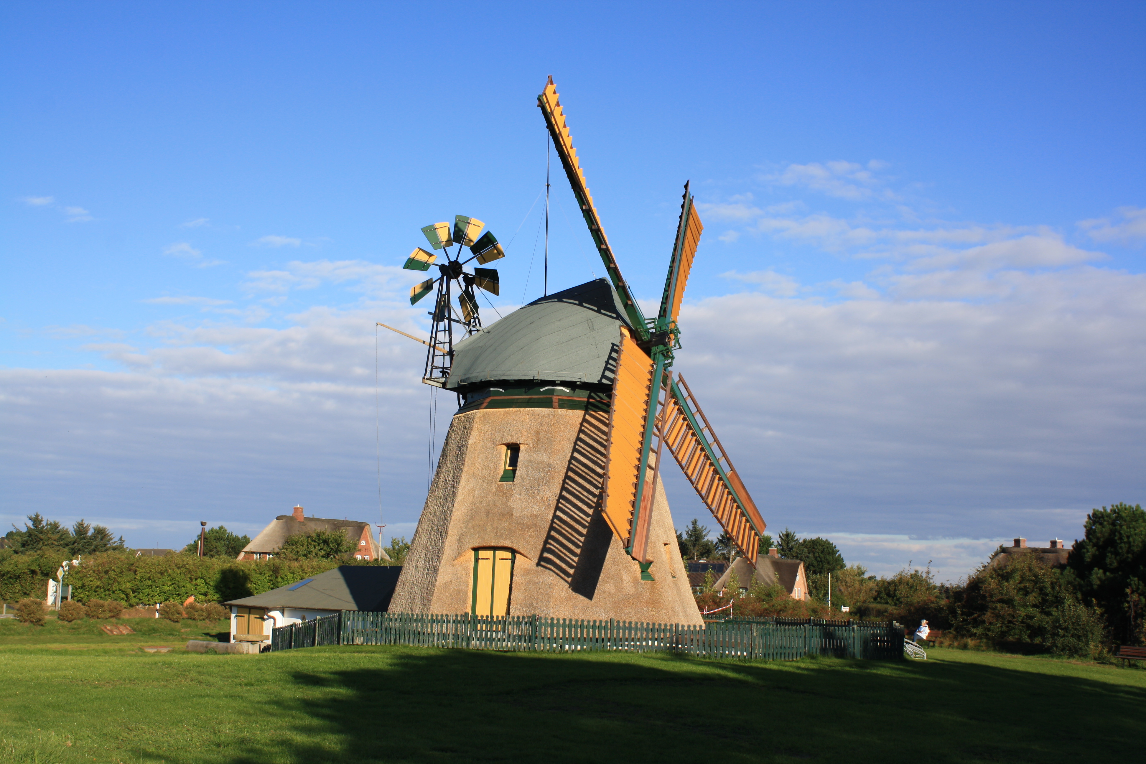 Amrum